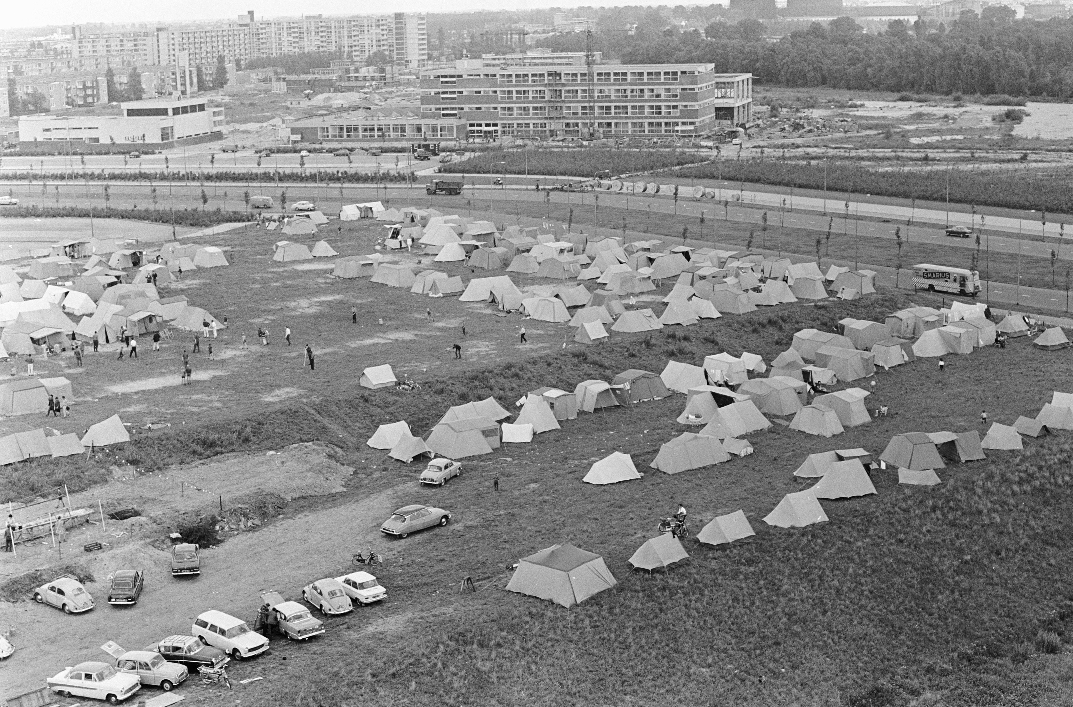 Collectie / Archief : Fotocollectie Anefo Reportage / Serie : [ onbekend ] Beschrijving : Camping Jehova op Ringdijk bij RAI-gebouw Datum : 16 augustus 1966 Locatie : Amsterdam, Noord-Holland Trefwoorden : Campings Instellingsnaam : RAI Fotograaf : Jongerhuis, Pieter / Anefo Auteursrechthebbende : Nationaal Archief Materiaalsoort : Negatief (zwart/wit) Nummer archiefinventaris : bekijk toegang 2.24.01.05 Bestanddeelnummer : 919-4539